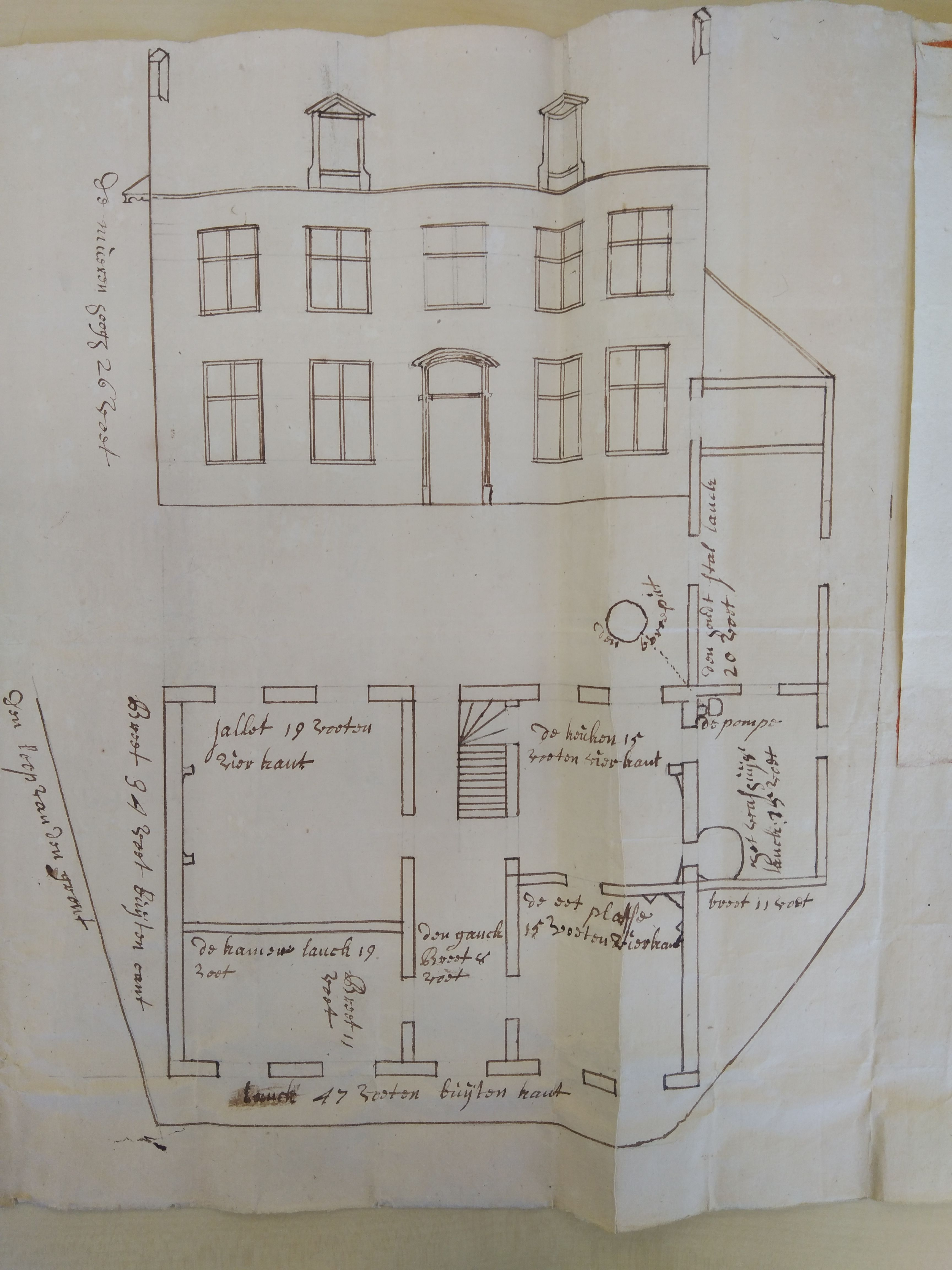 Modelplan deel 2 voor de pastorie te Wambeek